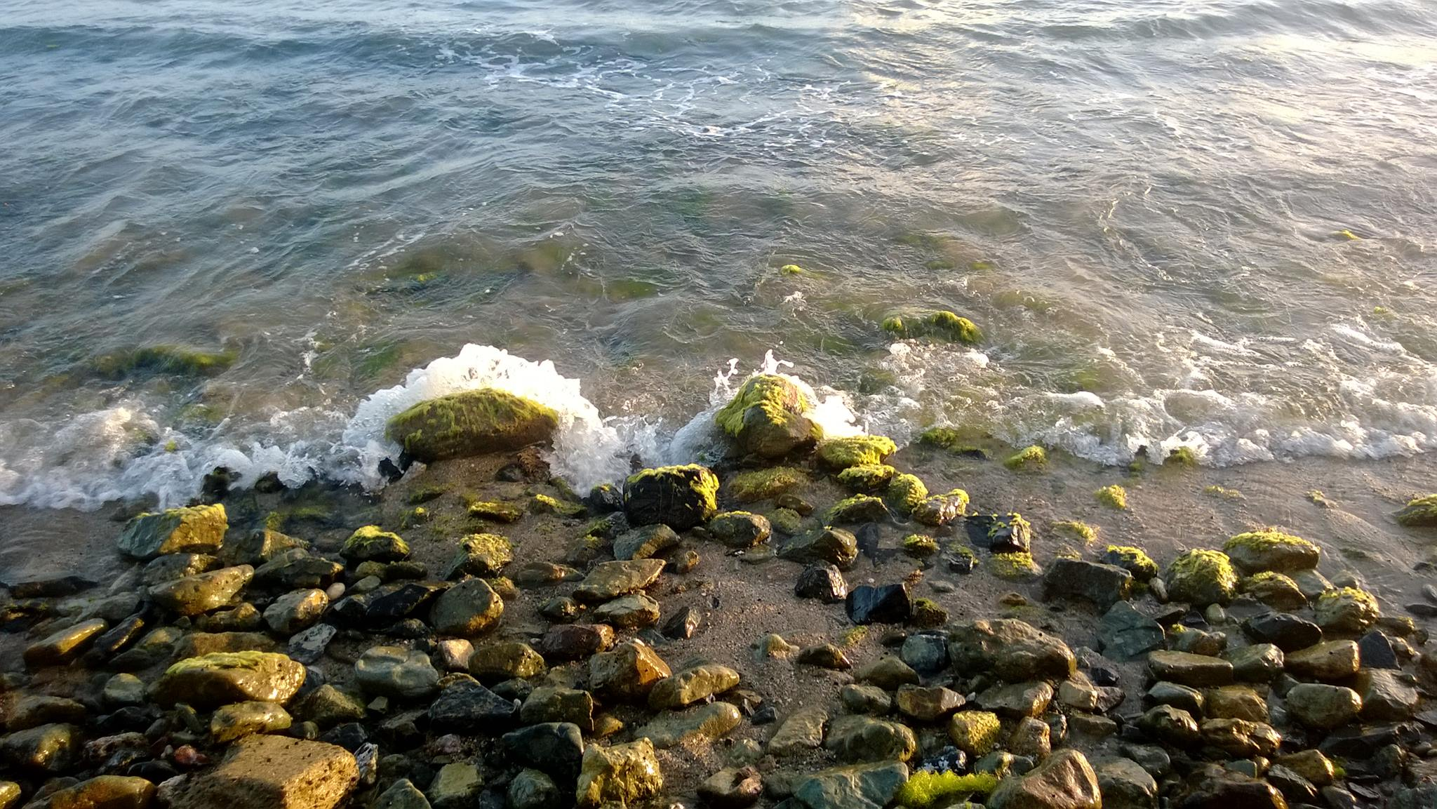 Playa Guardarraya, Patillas, Puerto Rico (2014)